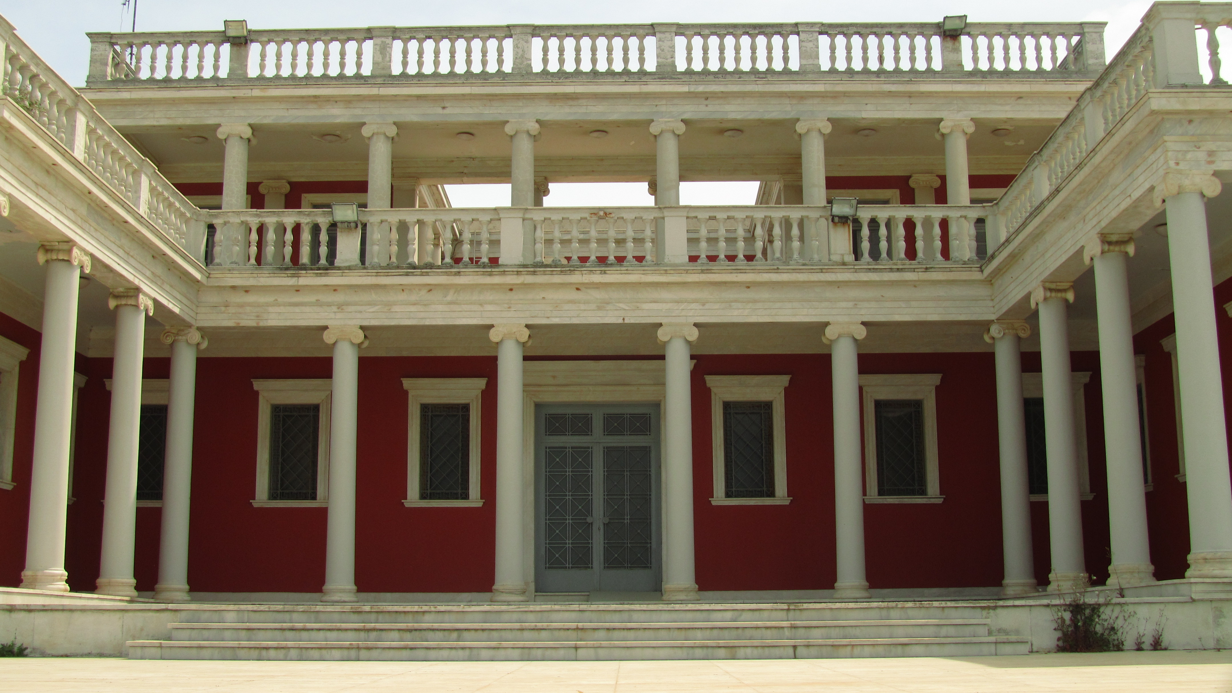 ΘΕΣΣΑΛΟΝΙΚΗ-ΚΑΛΑΜΑΡΙΑ- ΤΟ ΠΑΛΑΤΑΚΙ